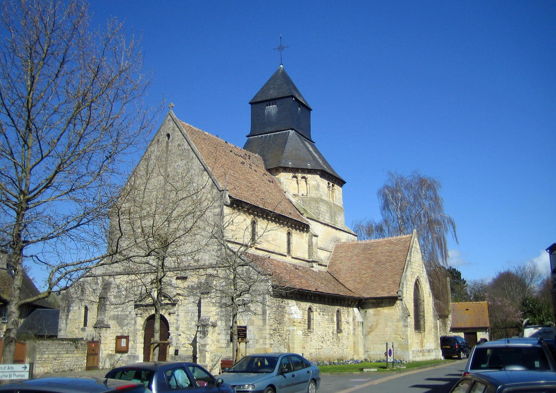 Eglise Saint-Pierre à Touques (Calvados, Normandie, France). XIe siècle.